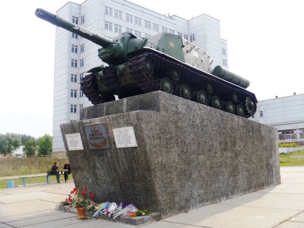 ИСУ-152